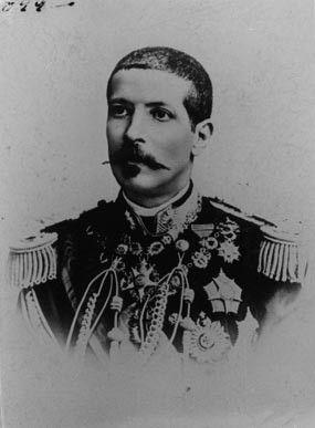 General Alexandre Alberto da Rocha de Serpa Pinto (159/1858) Arquivo Histórico Militar de Lisboa. O futuro general de brigada Serpa Pinto (1864; 1900), tendo prestado serviço na Madeira, em 1875, no batalhão de Caçadores n.º 12